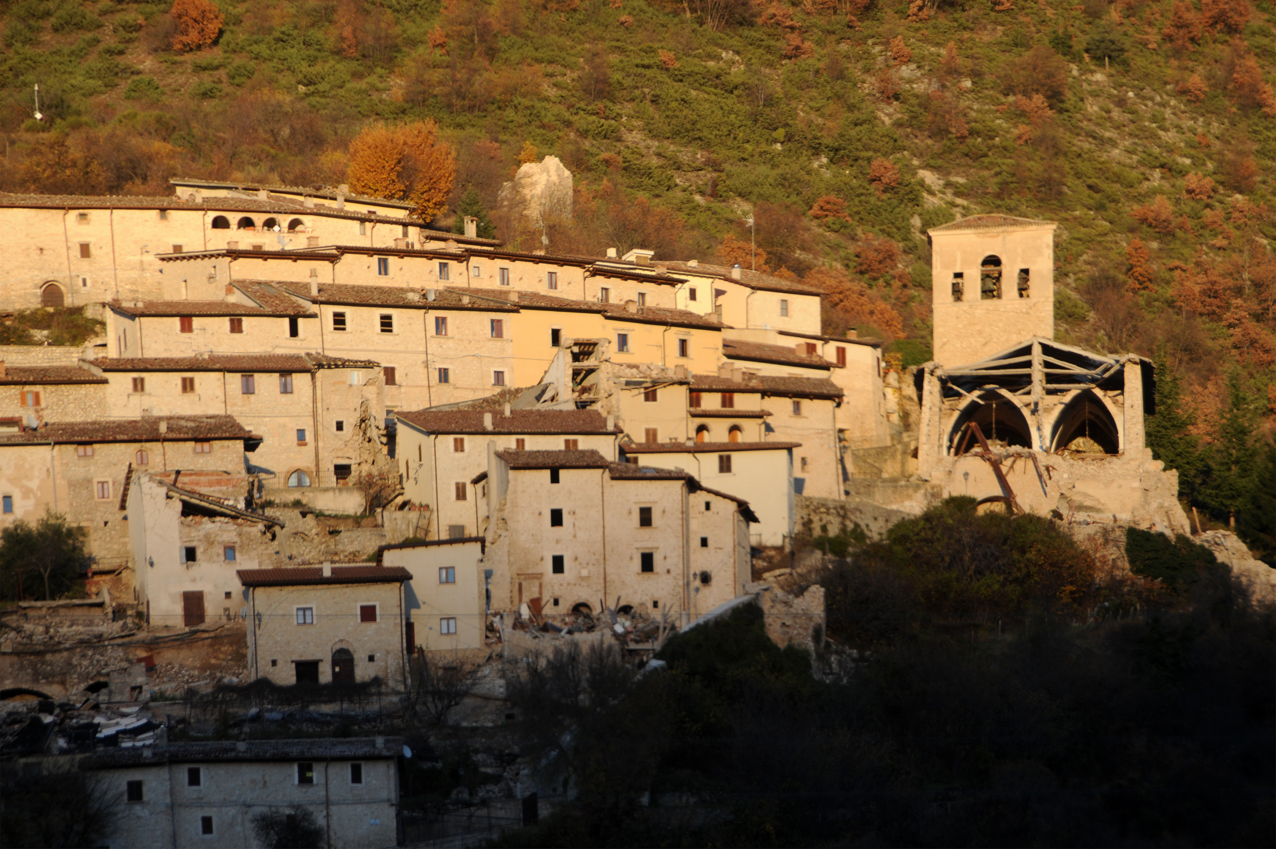 Portico e facciata di Sant'Andrea crollati, la Madonna di Piazza sotto le macerie, la Madonna delle Grazie che non c'è più, quanto dolore in una sola foto